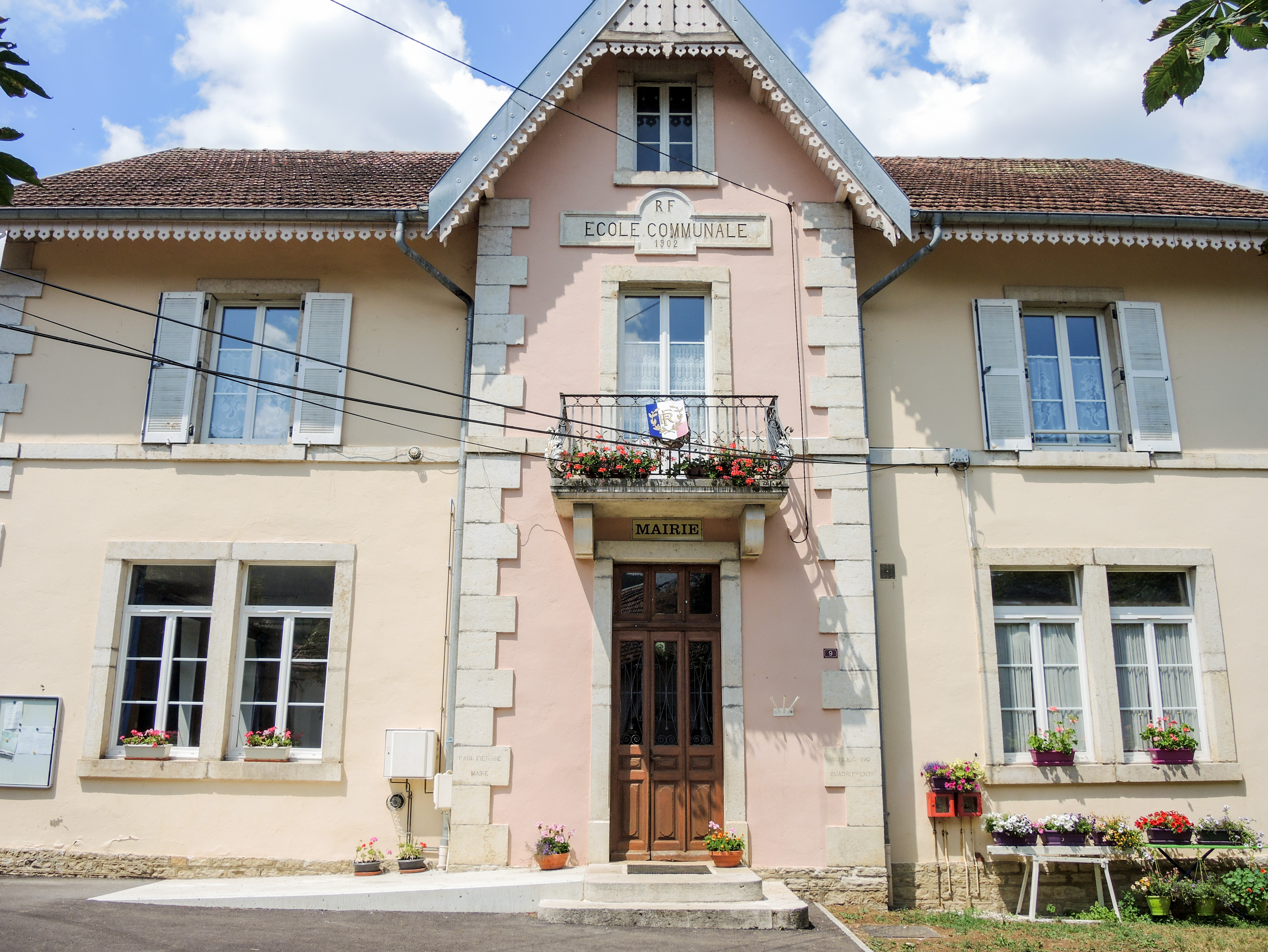 Façade de la mairie-école de Brémoncourt. Montancy. Doubs